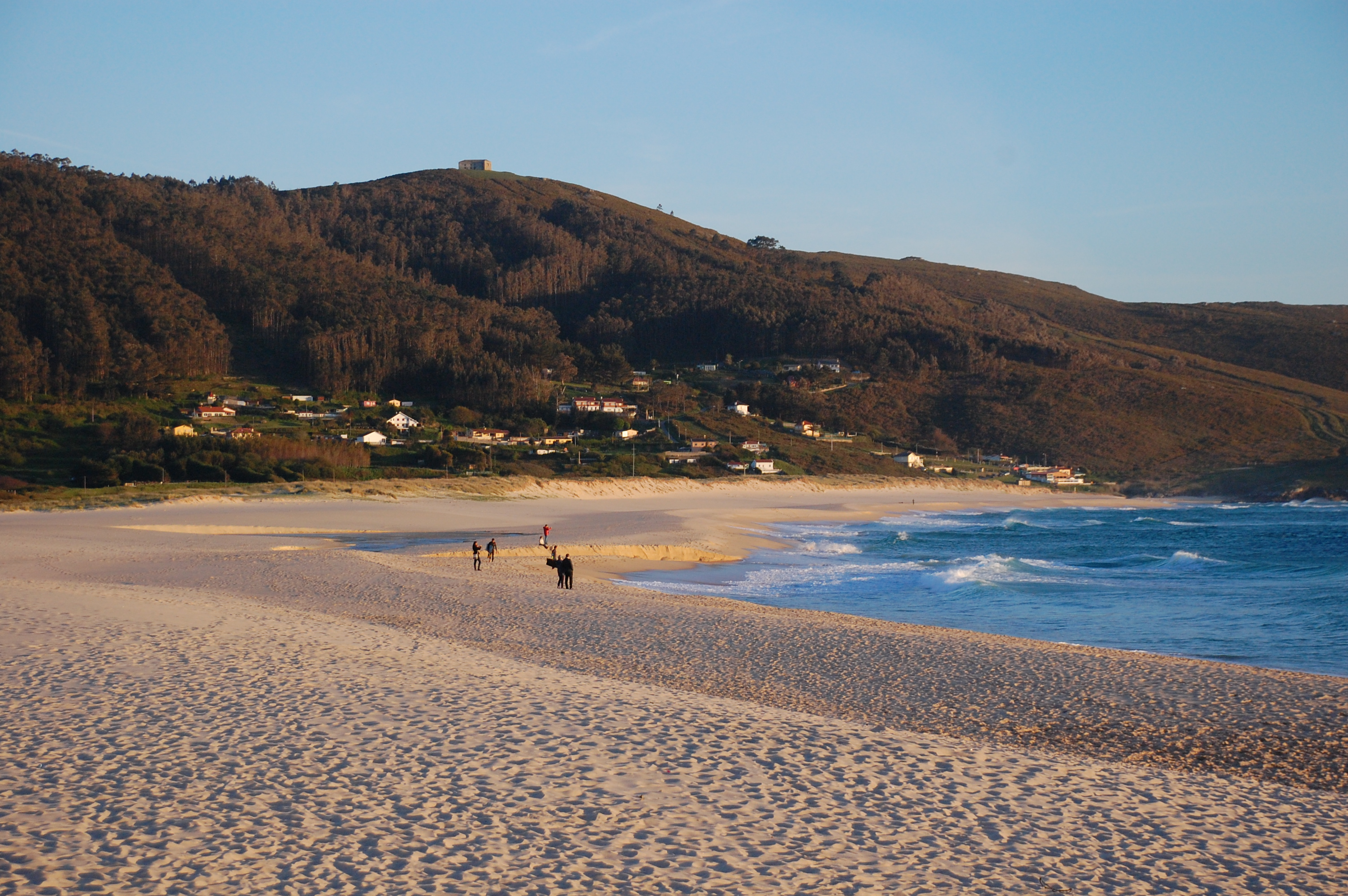 Praia de Doniños ó solpor, co regato da Lagoa no segundo plano e Monteventoso ó fondo. This is a photography of a Special Area of Conservation in Spain with the ID: ES1110002. Natura2000 entry, EEA entry